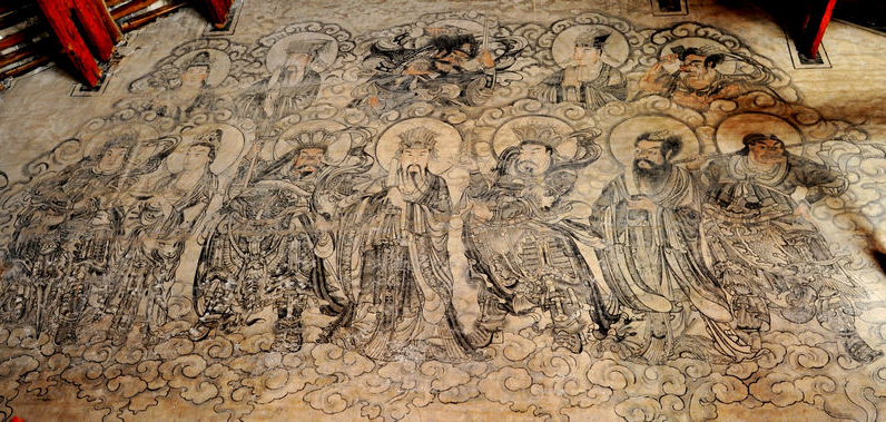 Xichuan